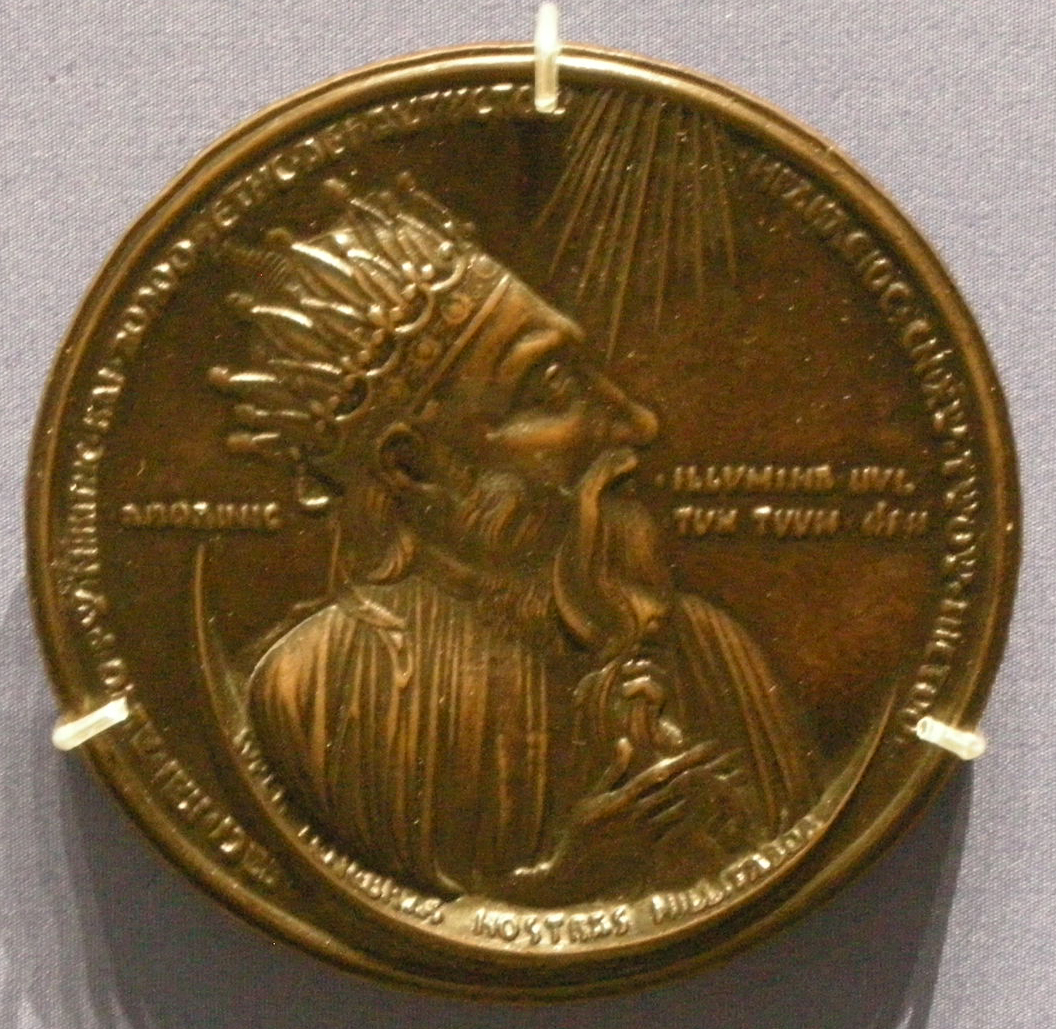 Scuola francese (forse Michelet Saulmon), medaglia bronzea di eraclio, 1400 ca